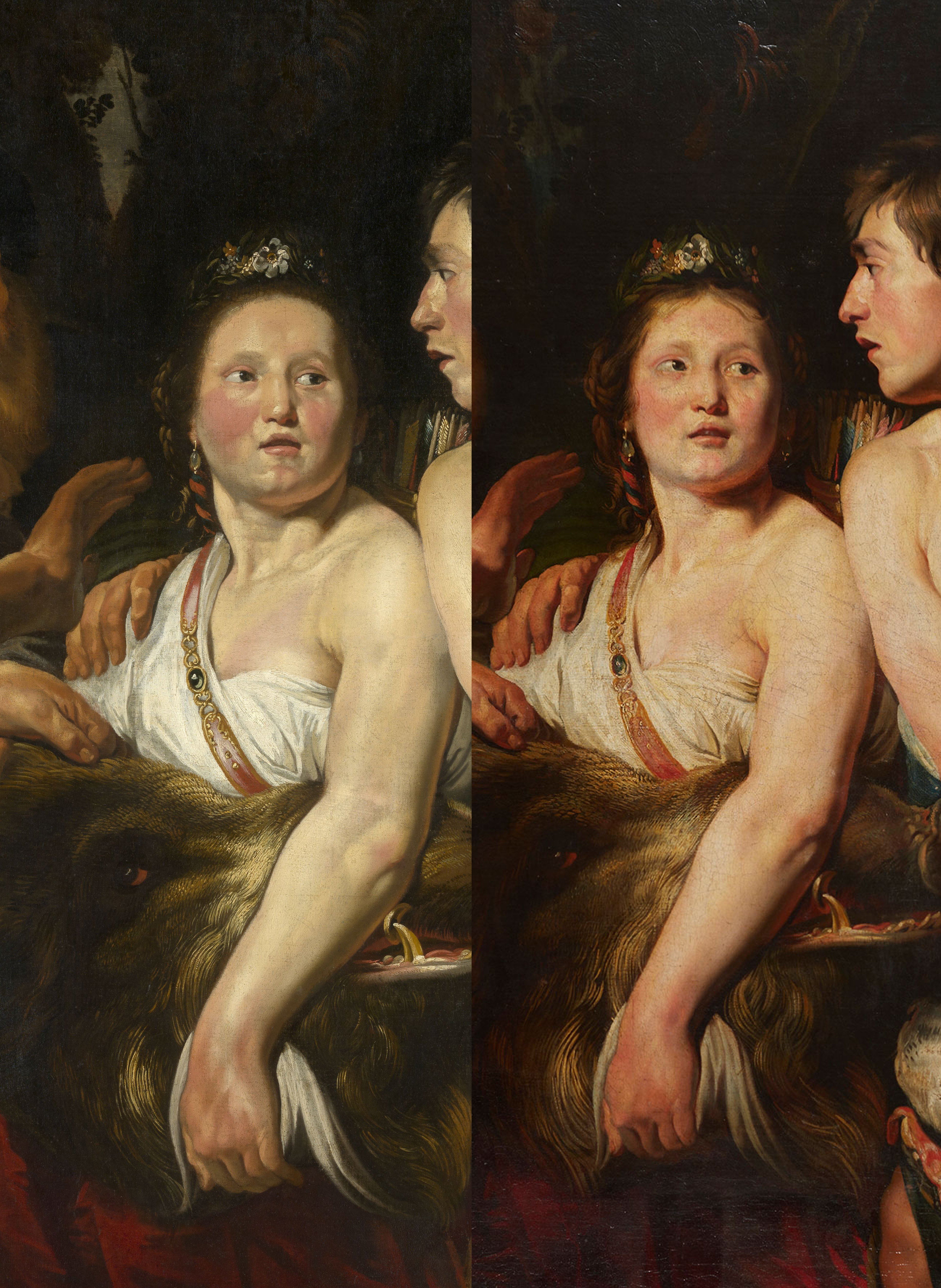 Фотоколлаж картин «Мелеагр и Аталанта»: слева - Королевский музей изящных искусств, Антверпен справа - Екатеринбургский музей изобразительных искусств, Екатеринбург